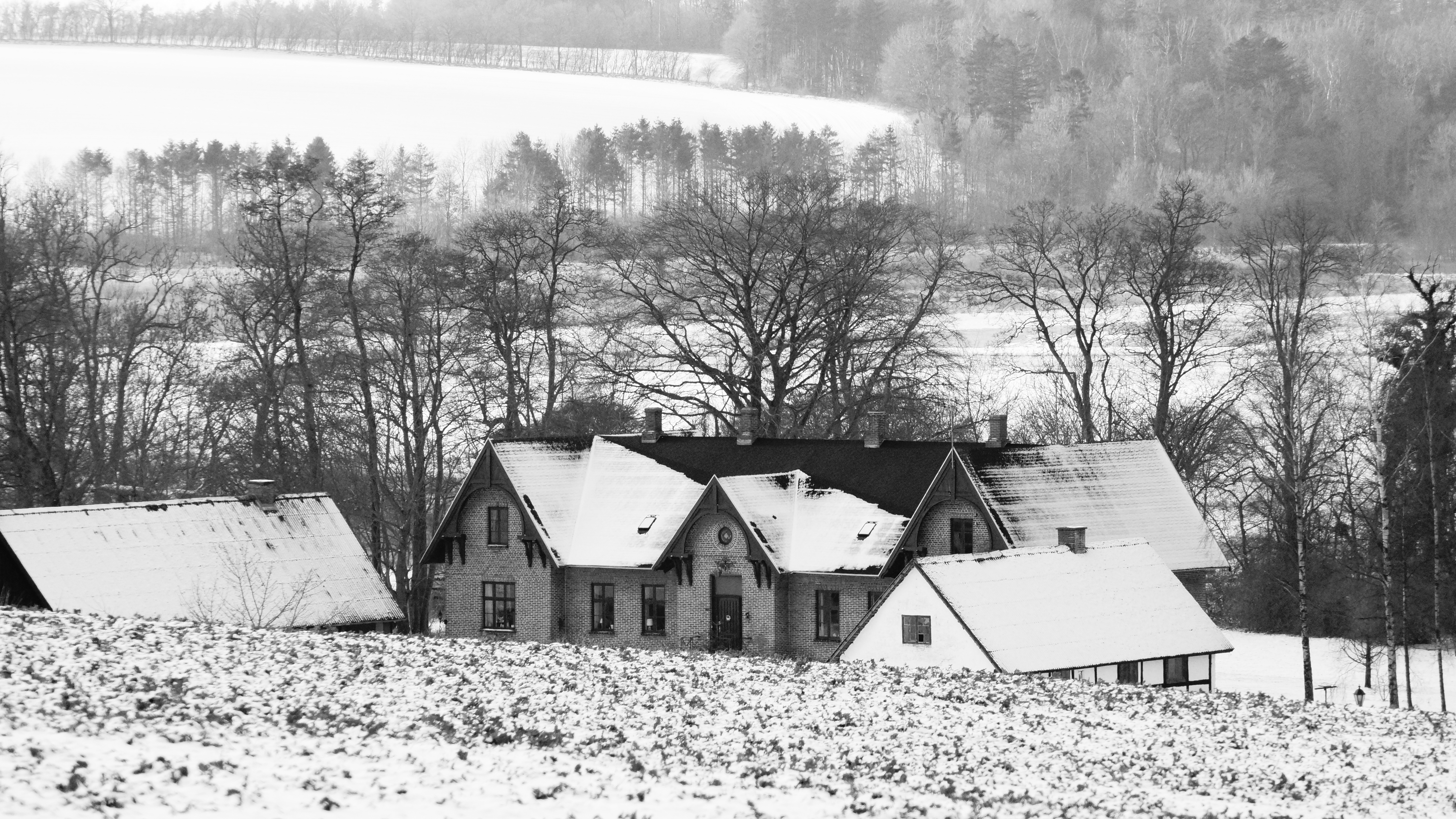 Fævejle ligger ved Kolindsund midt på Djursland.